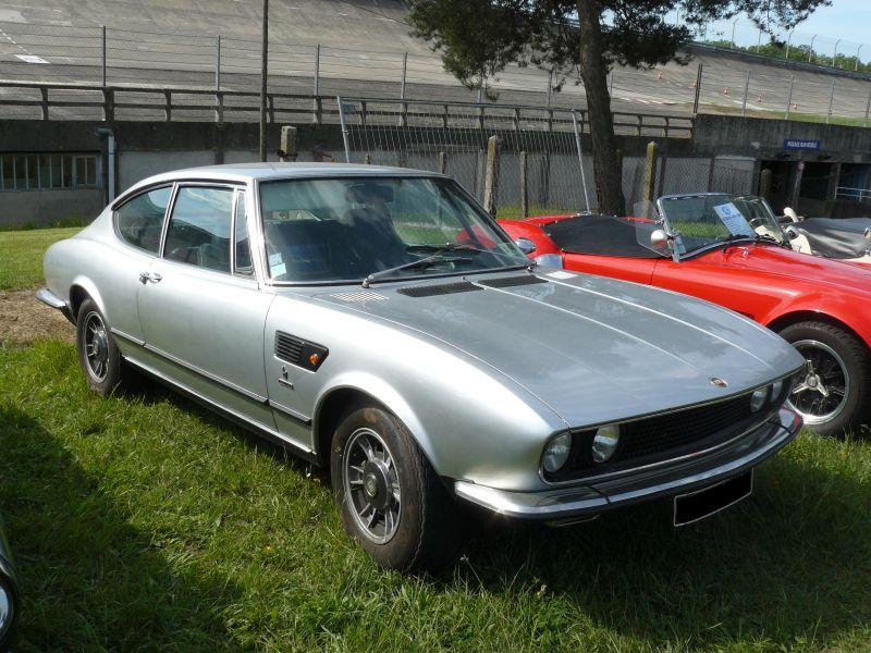 montlhery 2012